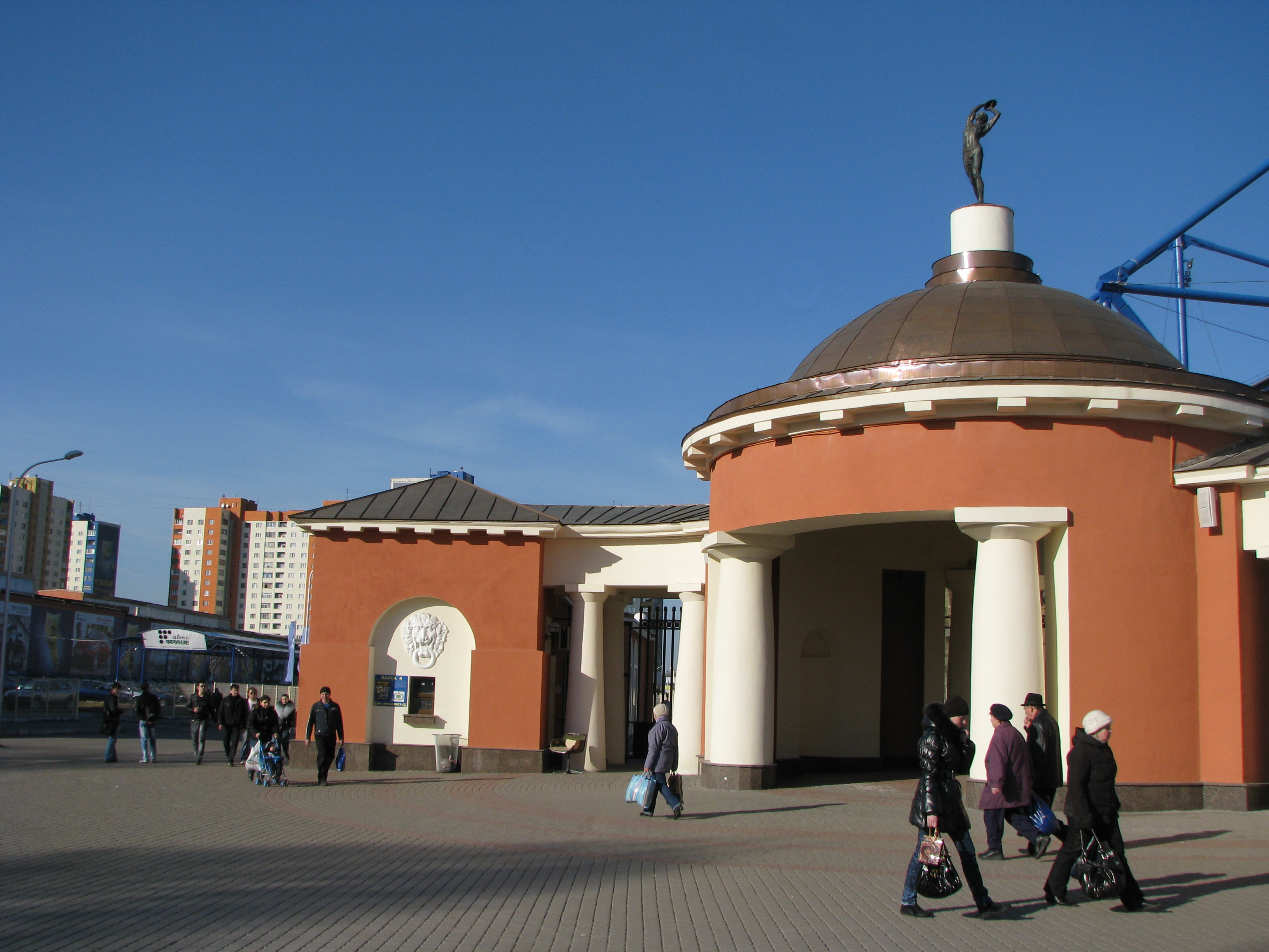 Касовий павільйон, Харків, вул. Плеханівська, 65